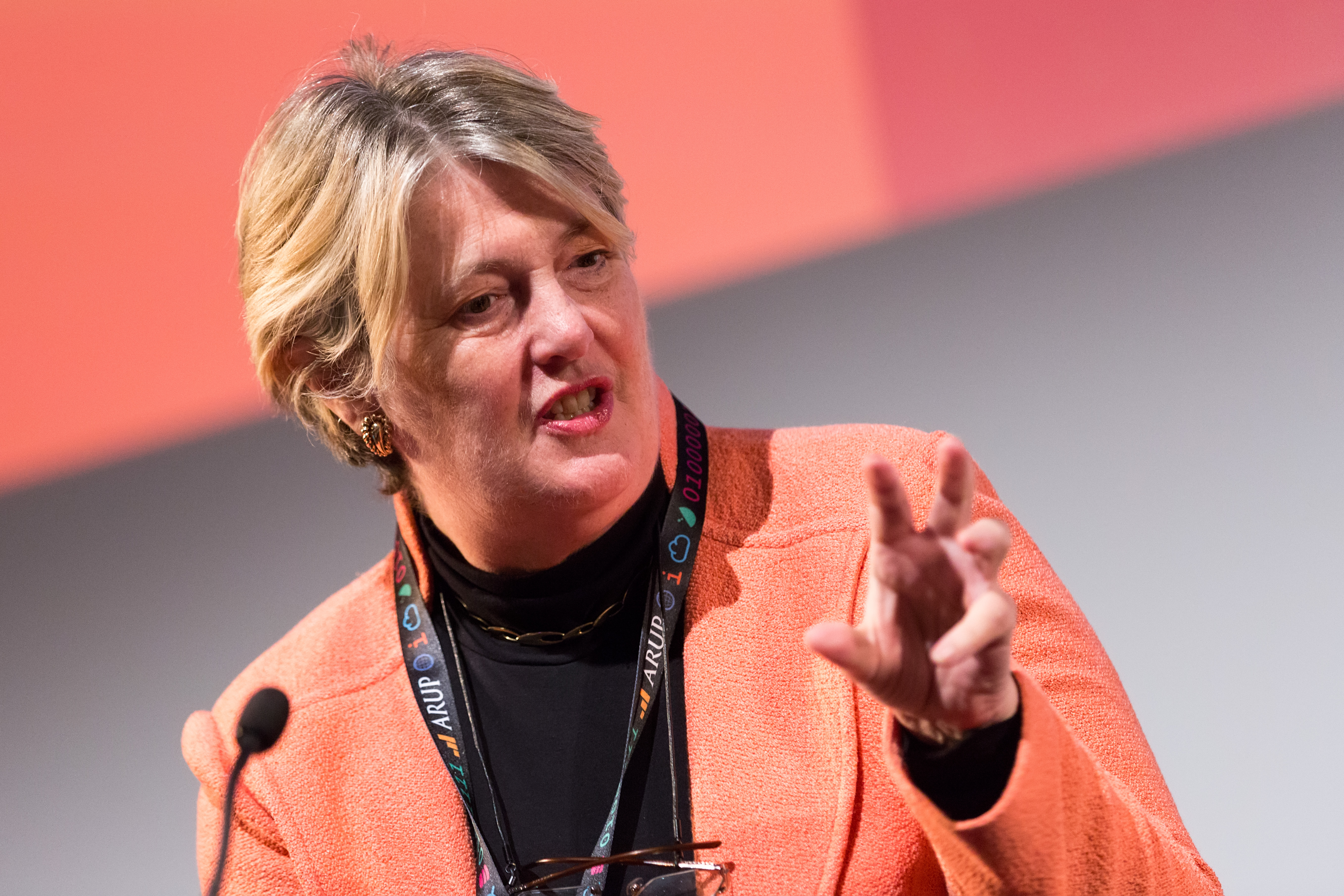 ODISummit_4Nov_149